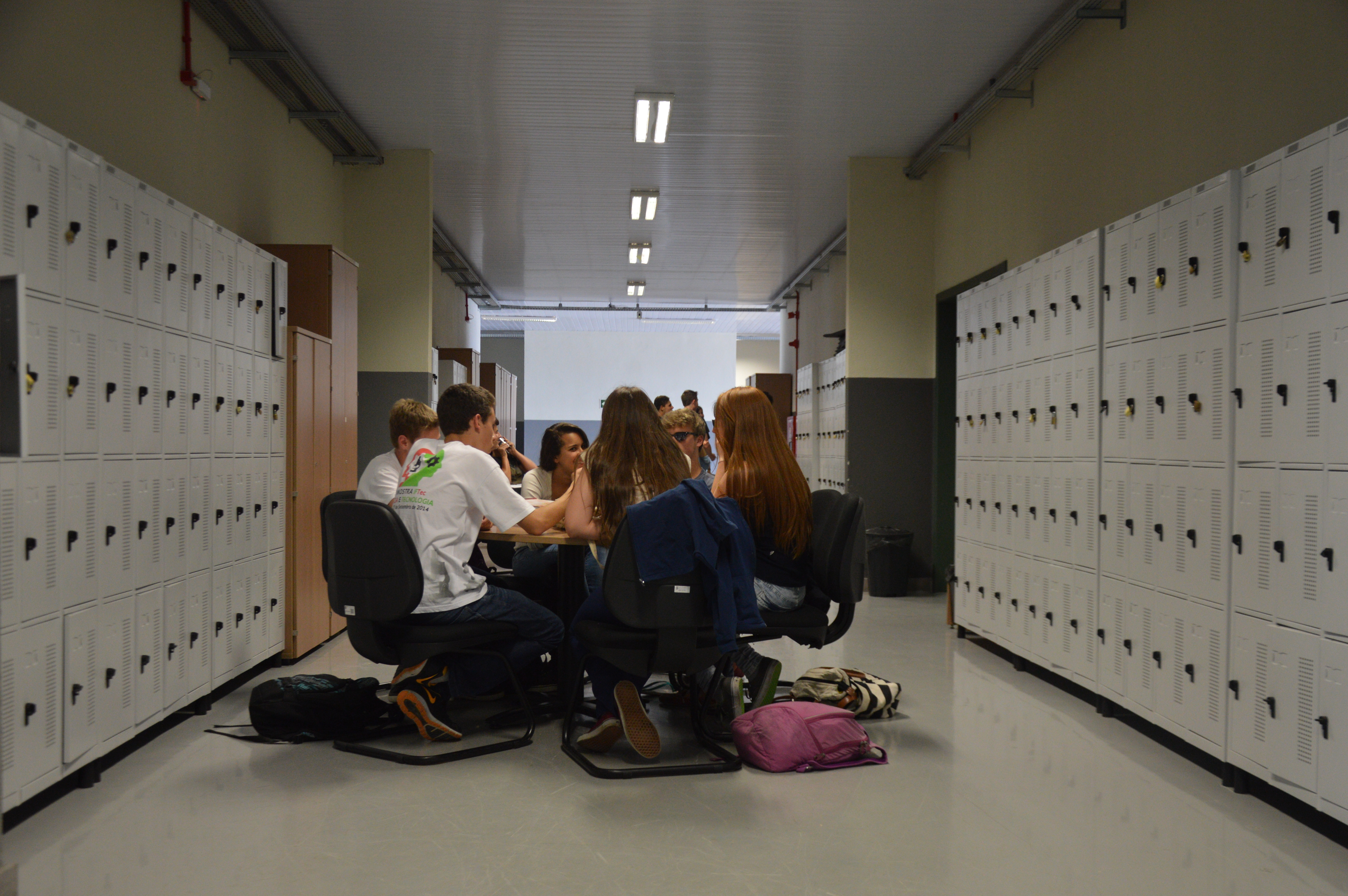 Estudantes no bloco A4 do Campus Caxias do Sul -Instituto Federal de Educação, Ciência e Tecnologia do Rio Grande do Sul